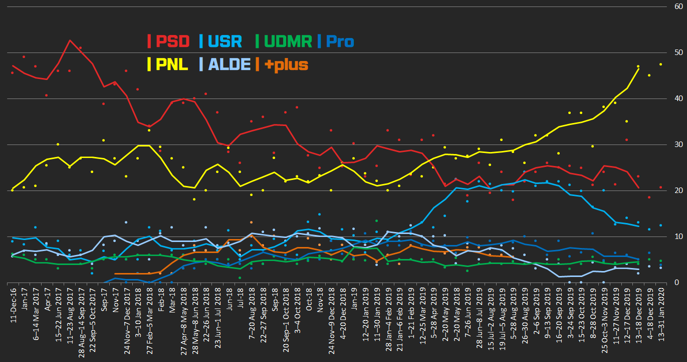 2020년 루마니아 여론조사